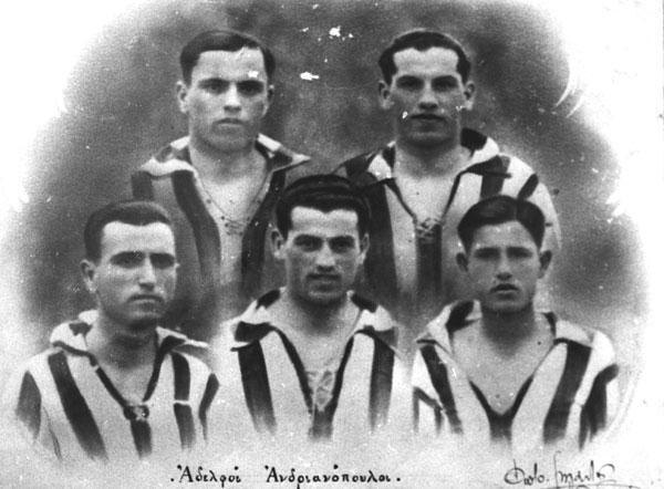 Andrianopoulos brothers, Olympiacos' iconic football players: (from left) Yiannis, Dinos, Giorgos, Vassilis and Leonidas Andrianopoulos Τα αδέλφια Ανδριανοπουλοι, η θρυλική επιθετική πεντάδα του Ολυμπιακού: (από αριστερά) Γιάννης, Ντίνος, Γιώργος, Βασίλης και Λεωνίδας Ανδριανόπουλος